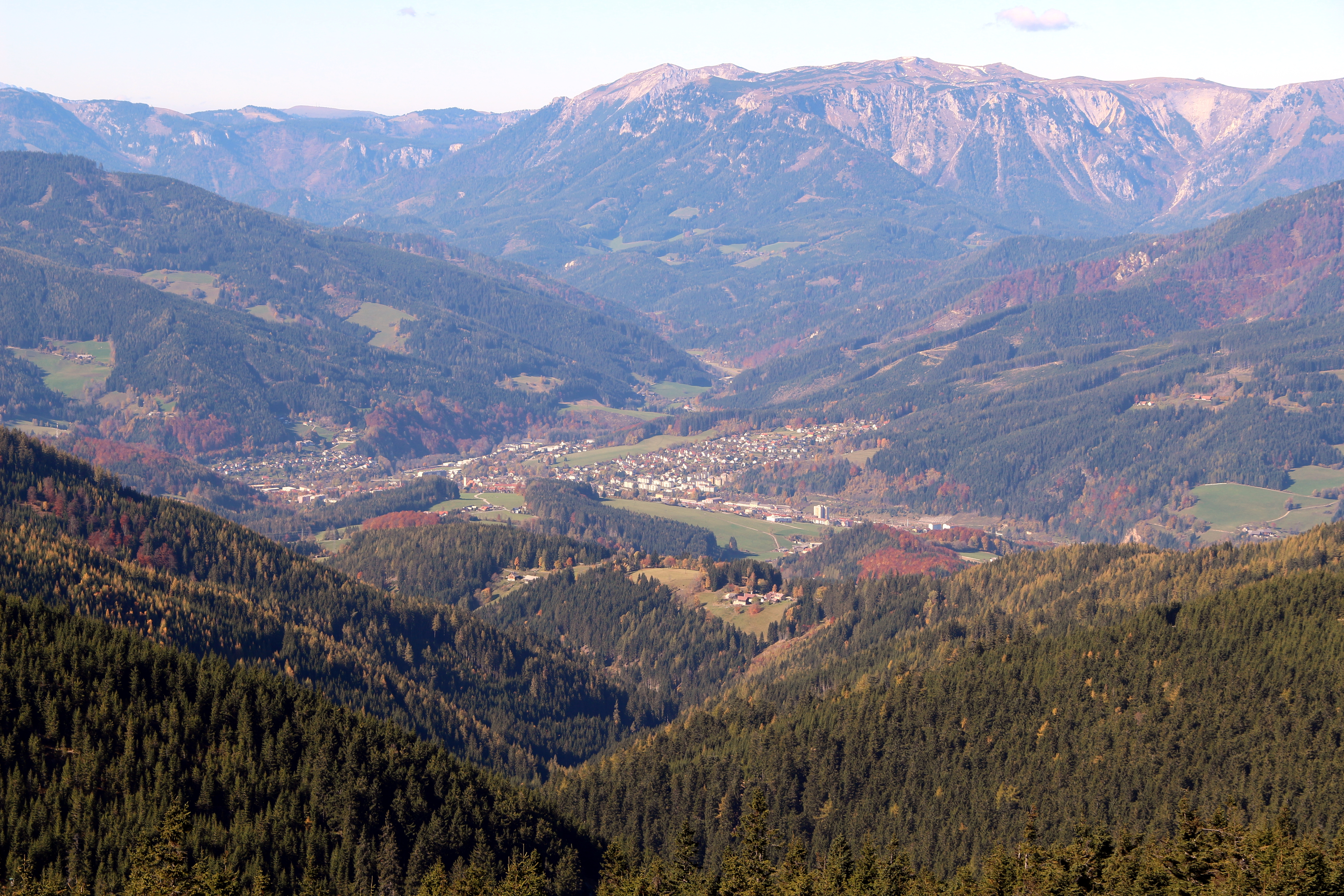 Ortsansicht von Mürzzuschlag, gesehen von der (Osten), im Hintergrund die Schneealpe.